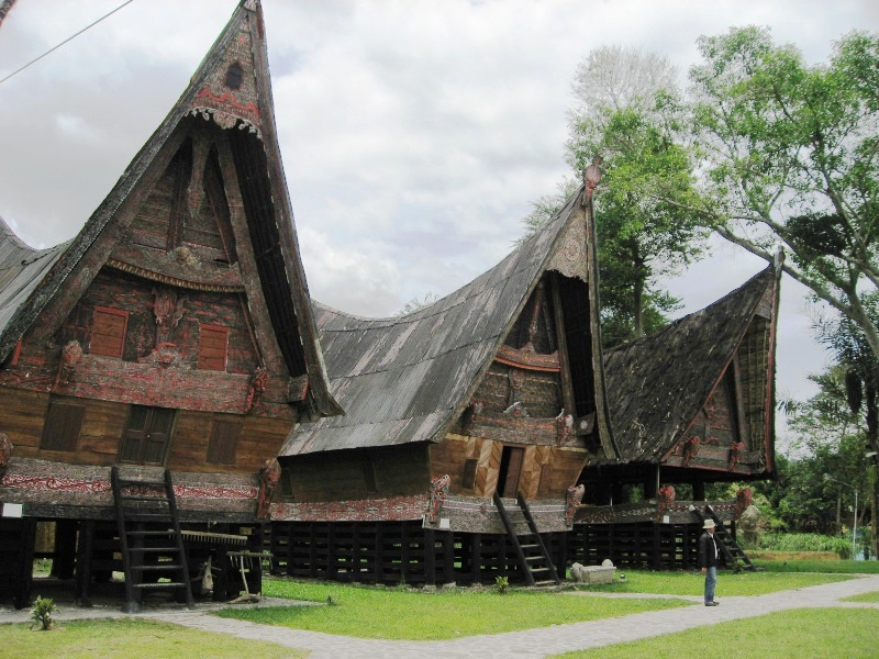 Rumah Batak